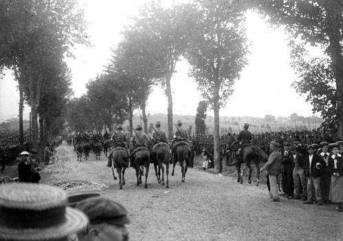 Fonds Trutat - Photographie ancienne Cote : TRU C 1644 Localisation : Fonds ancien (S 30) Original non communicable Titre : Défilé militaire, cavalerie sur un chemin de campagne Auteur : Trutat, Eugène Rôle de l’auteur : Photographe Date de création : 1859-1910 [entre] Mesures : : 6 x 9 cm Mot(s)-clé(s) : -- Officier -- Soldat -- Uniforme -- Képi -- Cavalier -- Manoeuvre militaire -- Cavalerie -- Défilé -- Chemin -- Campagne -- Cheval -- Foule -- 19e siècle, 2e moitié -- 20e siècle, 1e quart Médium : Photographies -- Négatifs sur plaque de verre -- Noir et blanc -- Scènes Bibliothèque de Toulouse. Domaine public